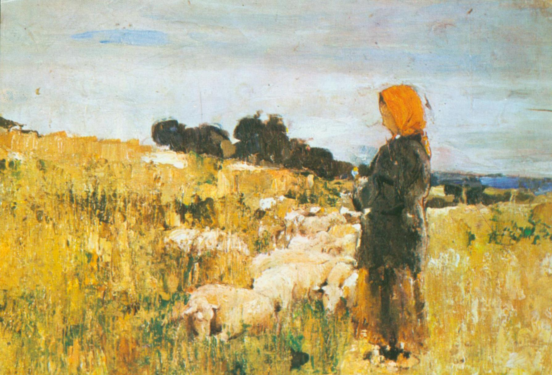 Păstoriţa